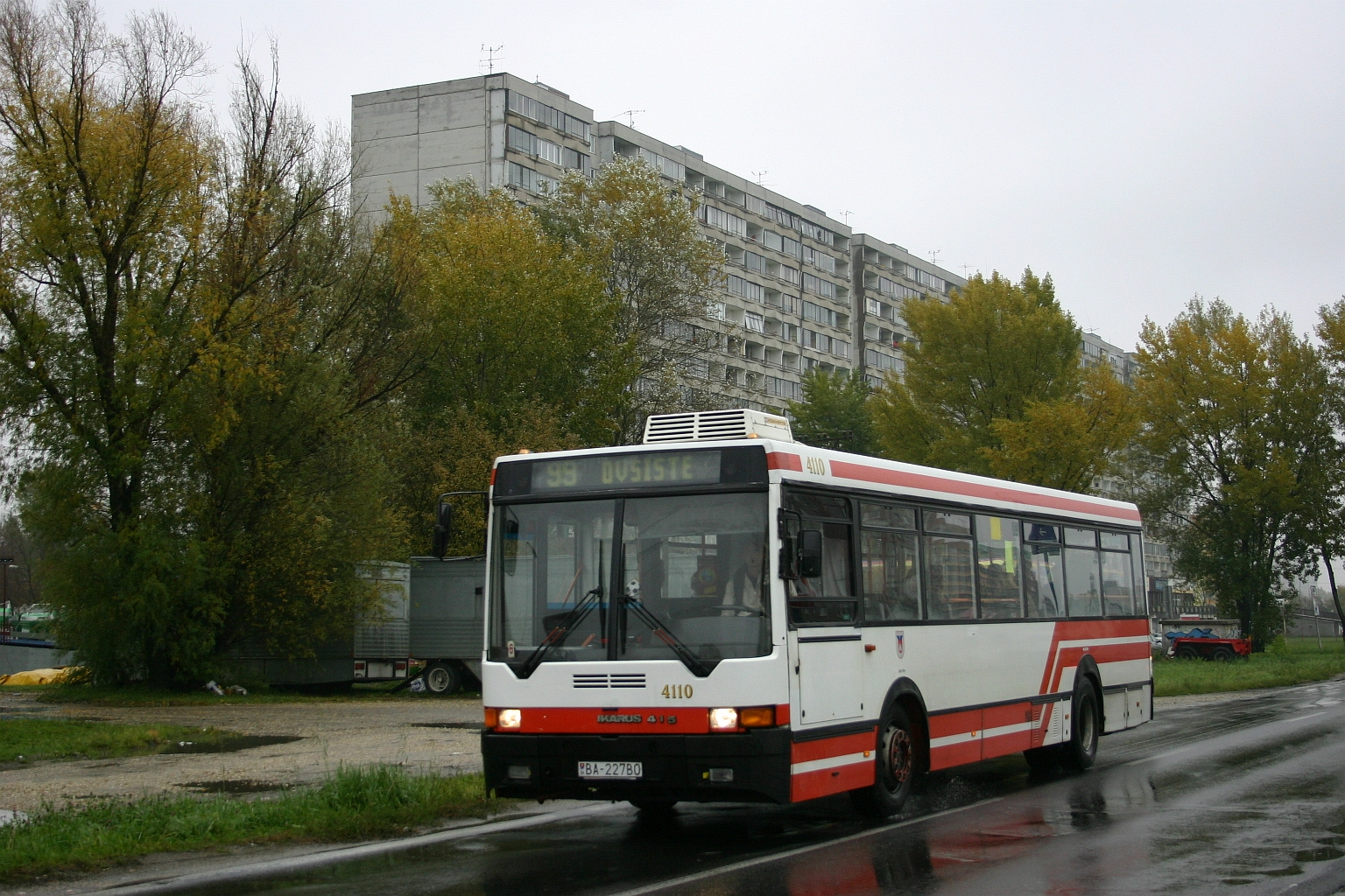 Ikarus 415 in Petržalka, Bratislava